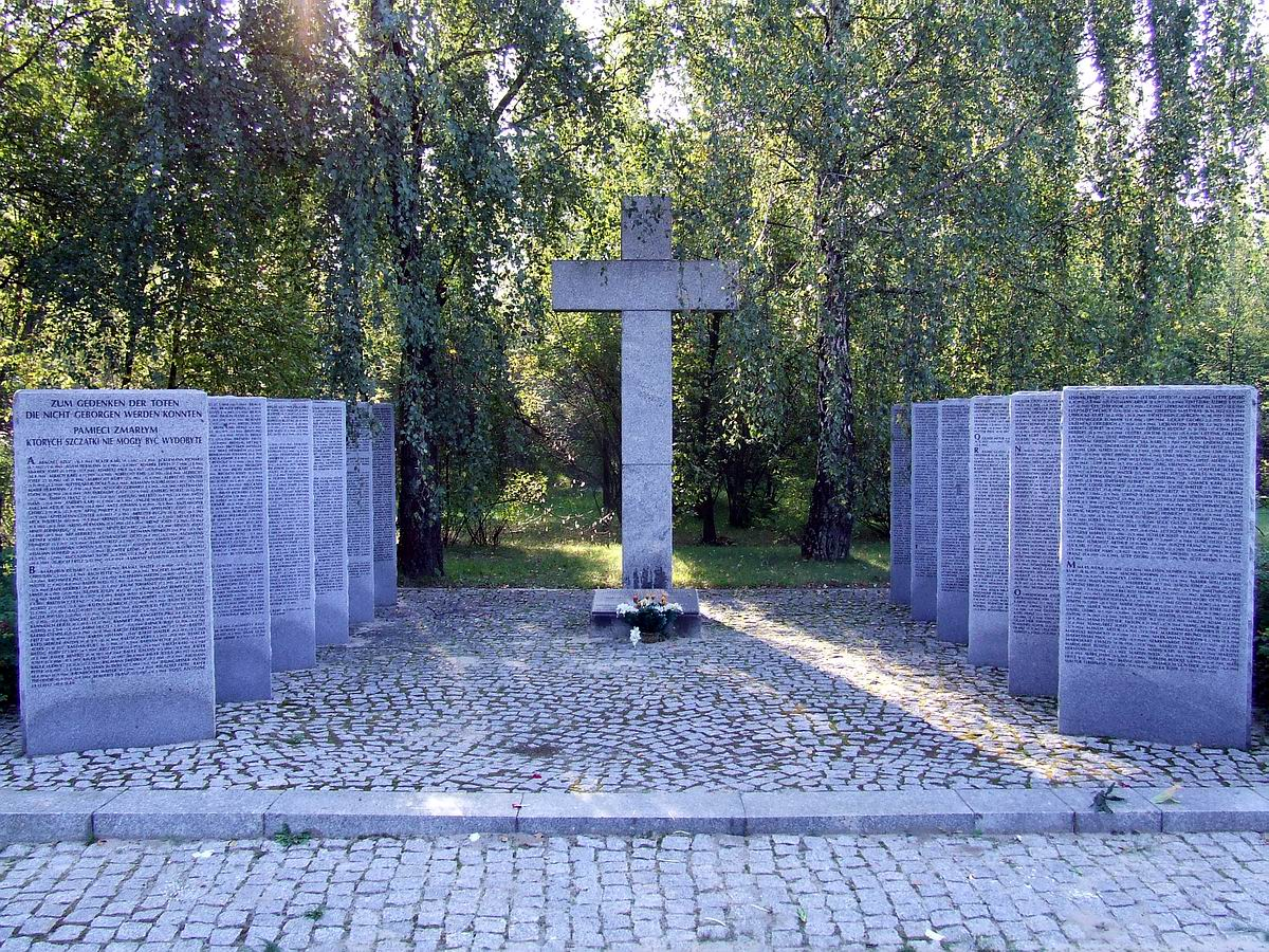 Kwatera żołnierzy niemieckich z lat 1939-1945 na Wólce